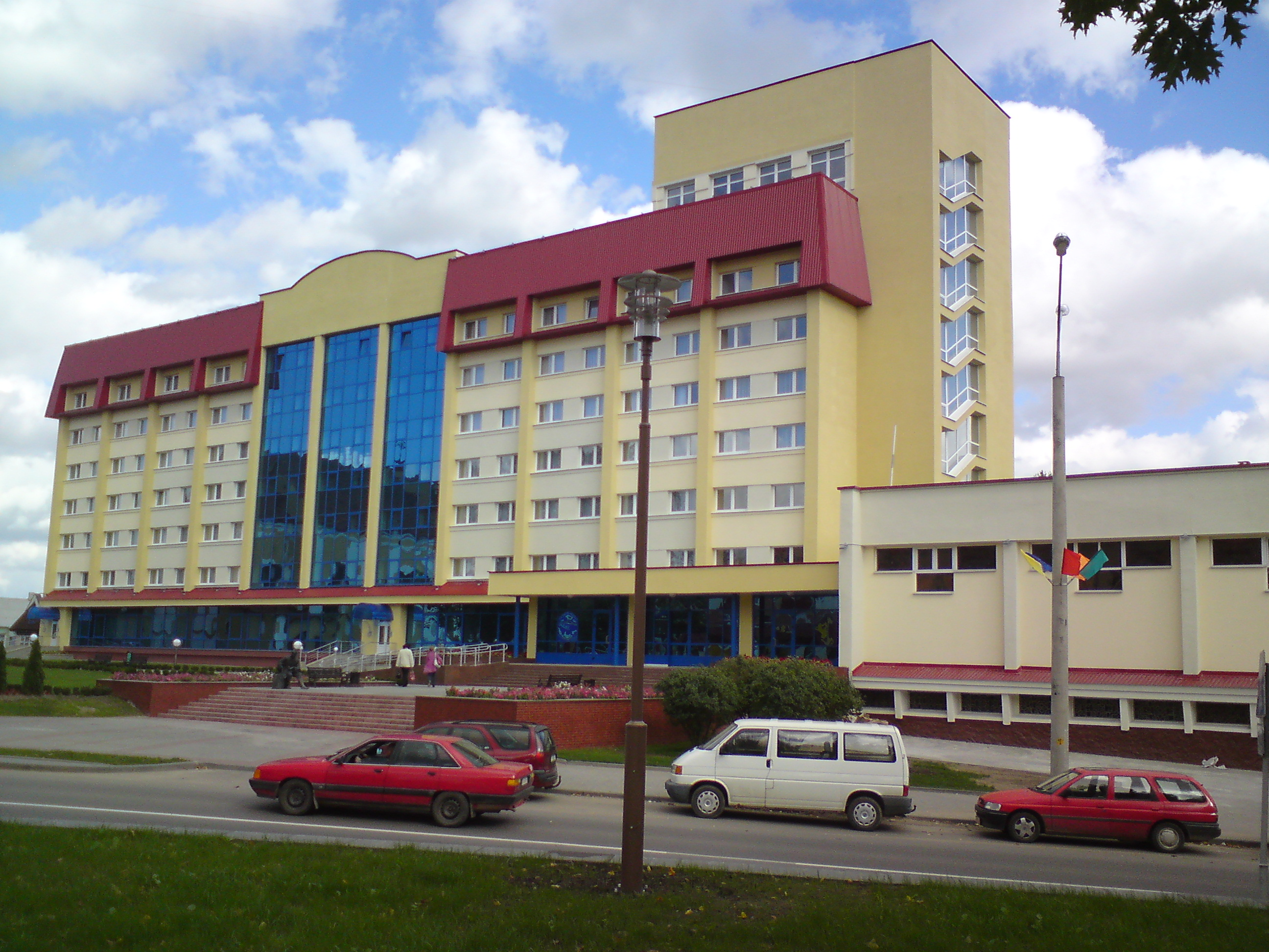 Гостиница "Лида"